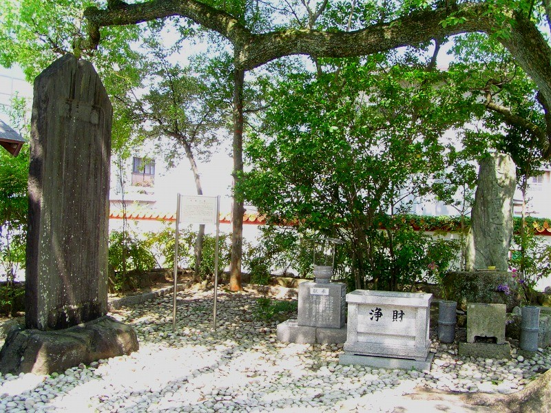 2005年8月1日徐福公園内で投稿者が撮影。Category:新宮市の画像、Category:都市公園・庭園の画像、Category:石碑画像。